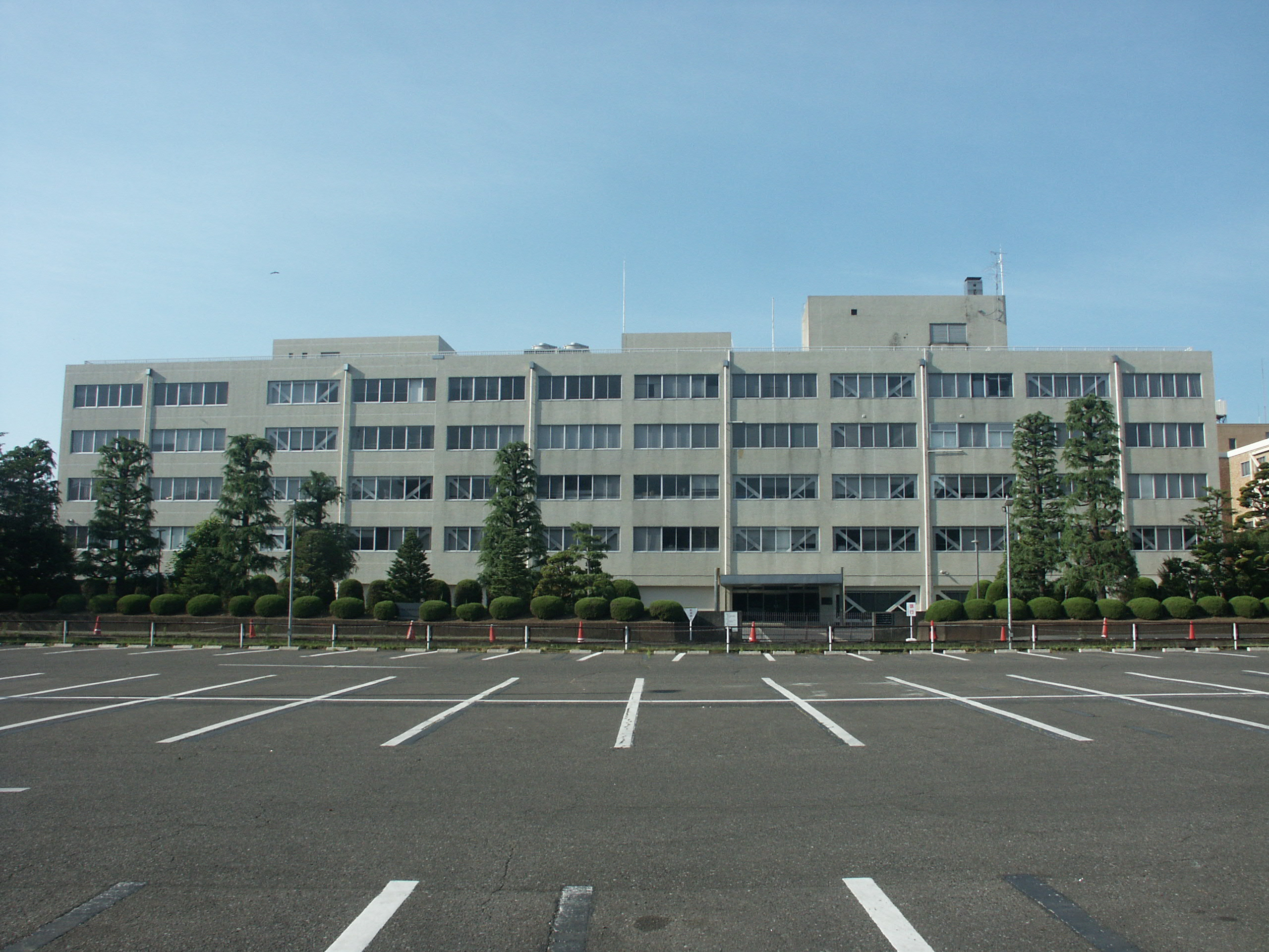 さいたま地方検察庁庁舎